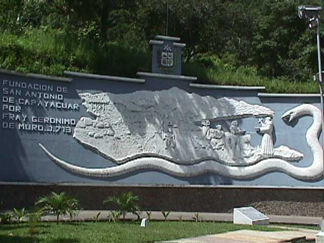 San Antonio de Capayacuar, estado Monagas - Venezuela (1998)